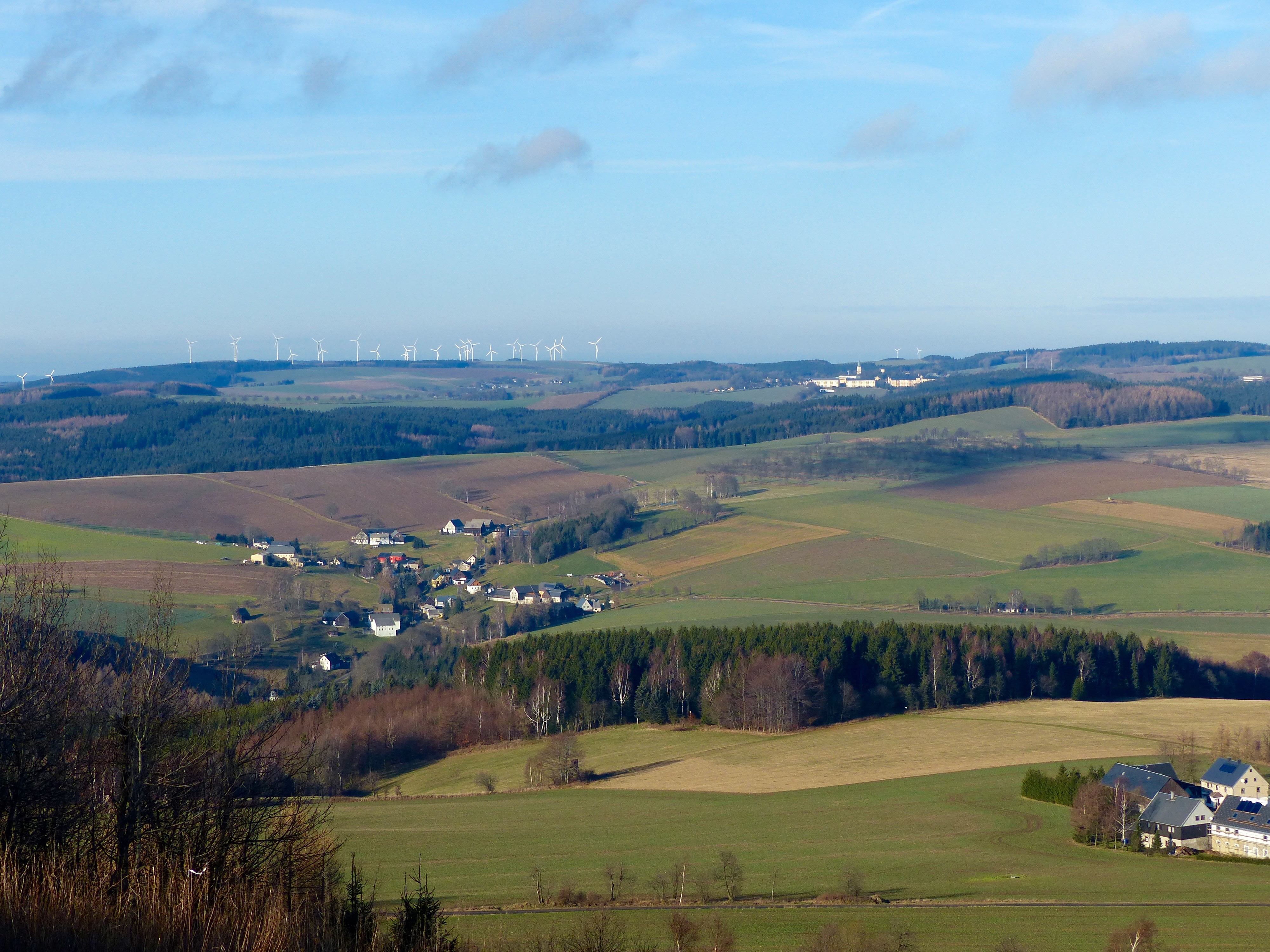 Blick vom Schwartenberg (Naturpark Erzgebirge / Vogtland): Blick nach Sayda und Heidersdorf